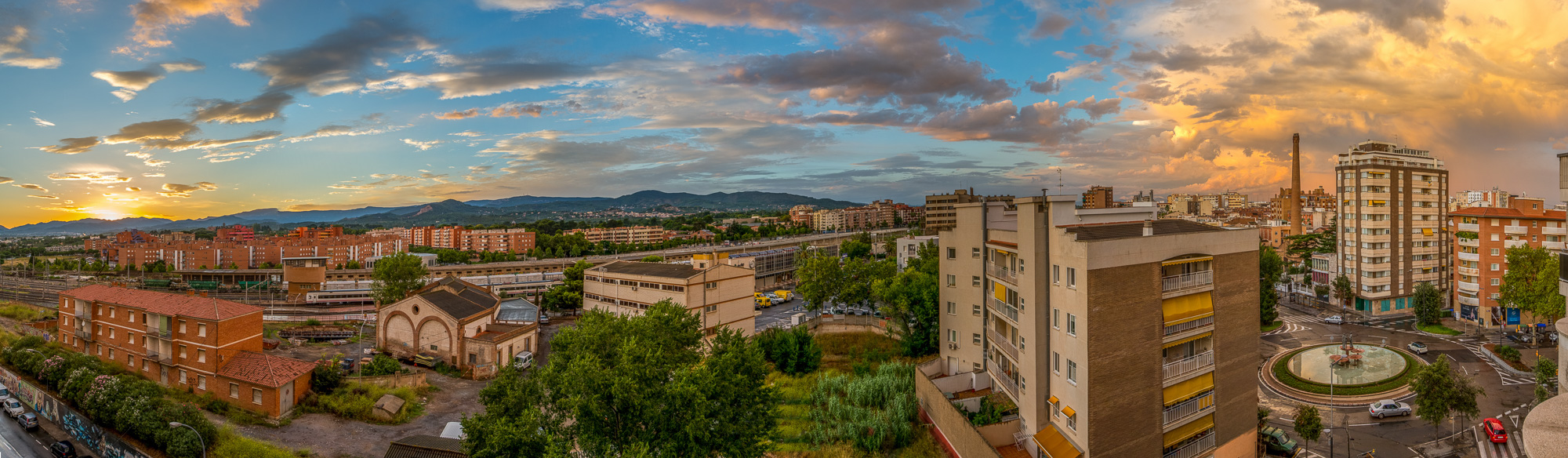 Aitor Escauriaza